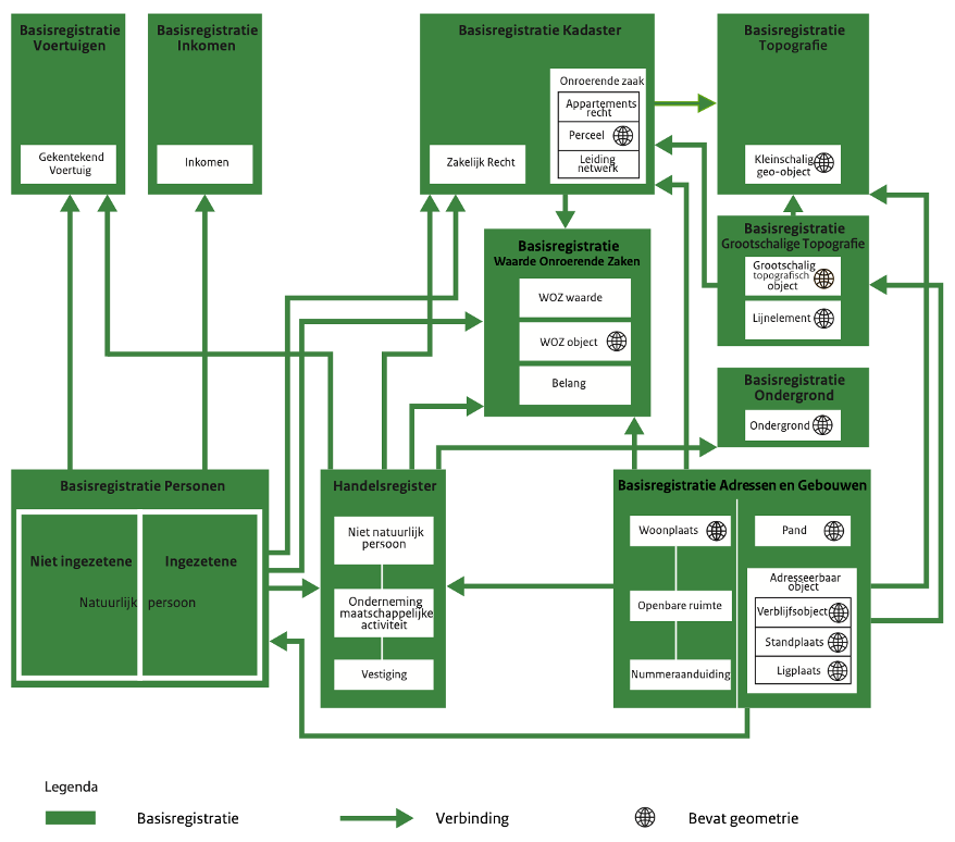 Het Stelsel van Basisregistraties is "Het geheel van afspraken en voorzieningen gericht op het doelmatige en efficiënte beheer van een beperkt aantal gegevens, die nodig zijn voor de uitvoering van de taken van de overheid, vastgelegd in gegevensverzamelingen met een wettelijke basis (de basisregistraties), inclusief hun onderlinge samenhang en de gemeenschappelijke voorzieningen die nodig zijn voor verzameling, verspreiding en gebruik."